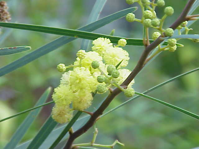 Species: Acacia melanoxylon Acacia retinodes Family: Mimosaceae Image No. 2